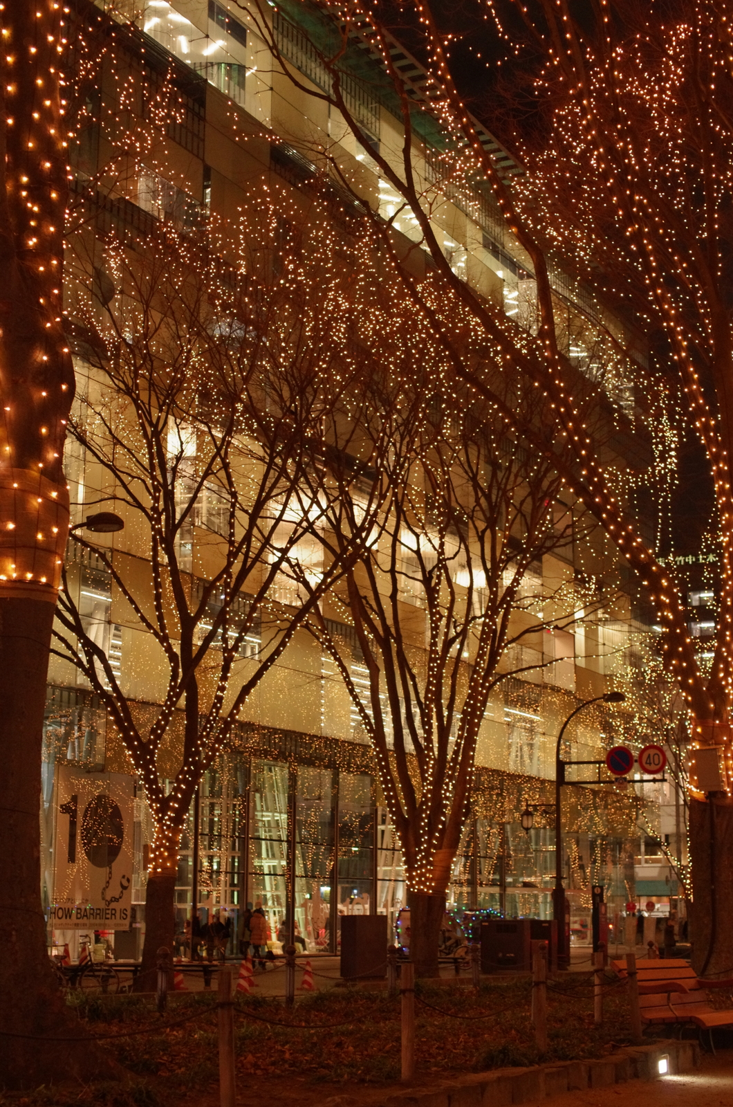 仙台メディアテーク前 Sendai Mediatheque